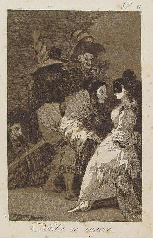 Capricho nº 6: Nadie se conoce de Goya, serie Los Caprichos